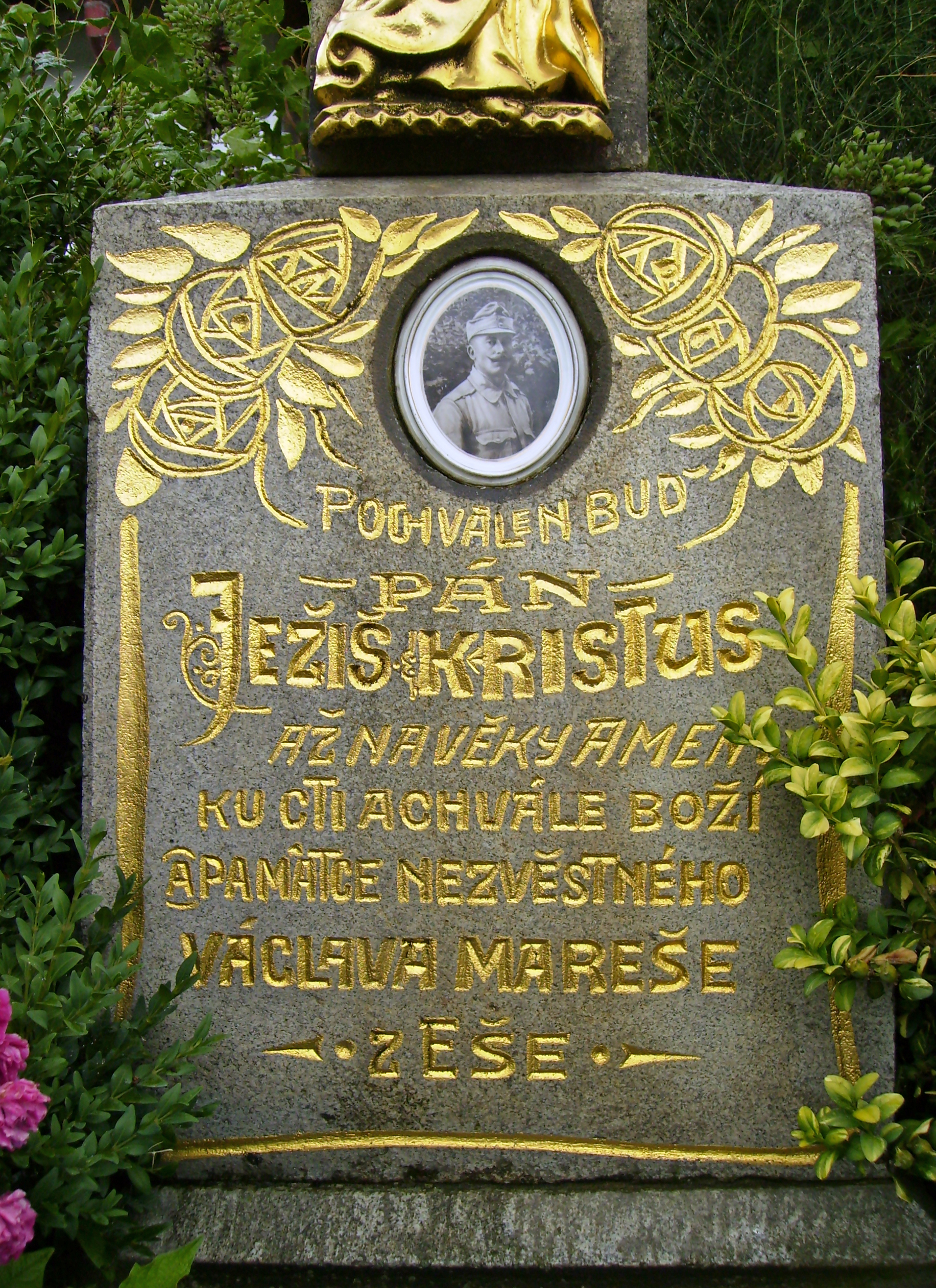 Obec Eš na Vysočině - památník padlému u silnice II/128.